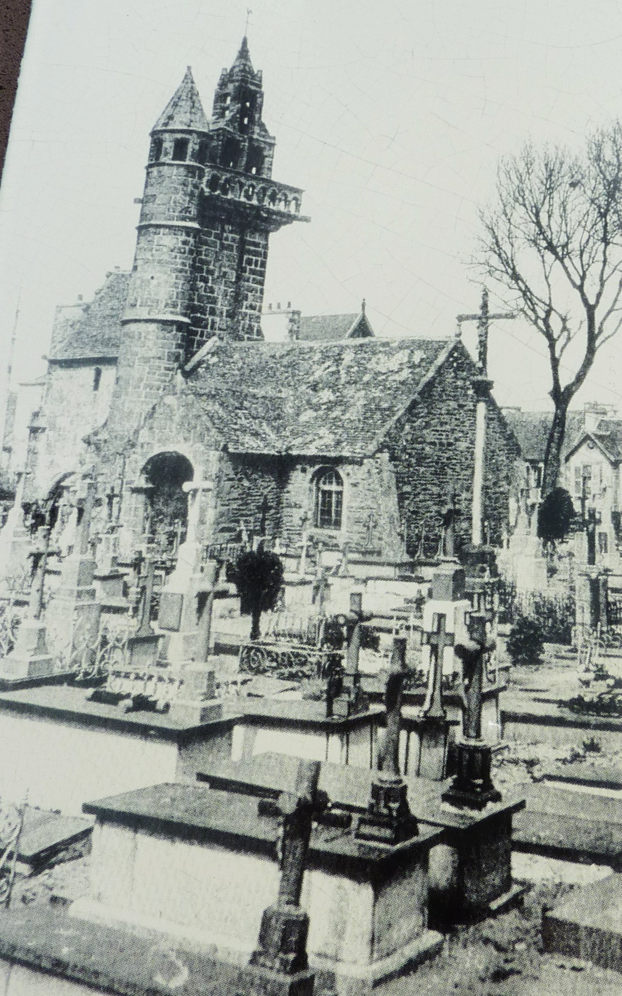 Henvic : la vieille église avant sa destruction partielle vers 1900 (donc photo de la fin du XIXe siècle)